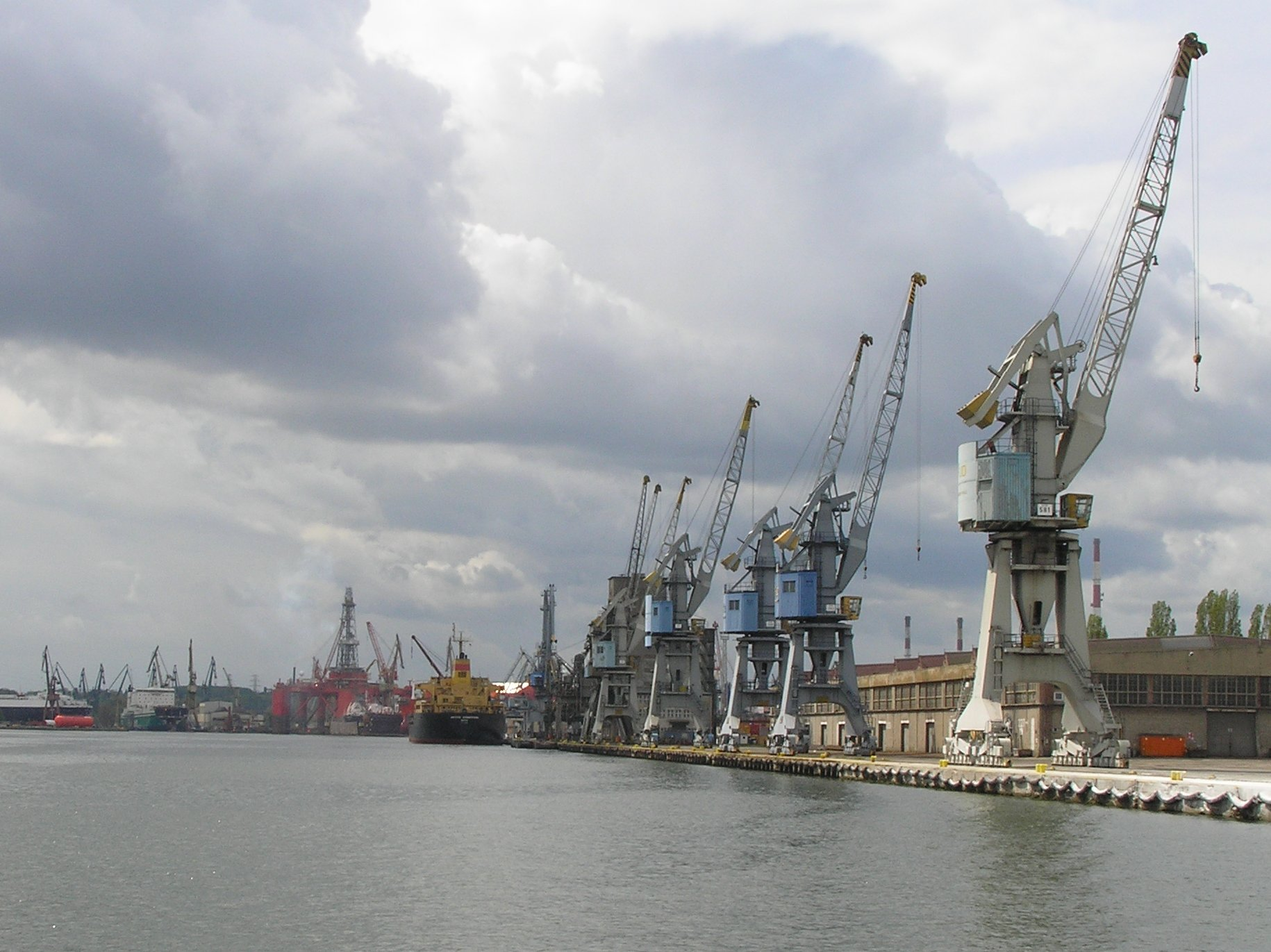 pl: Martwa Wisła, w tle "Stocznia Remontowa" w Gdańsku. Po prawej Nabrzeże Wiślane i osiedle Letnica. en: Harbour and shipyard in Gdańsk.